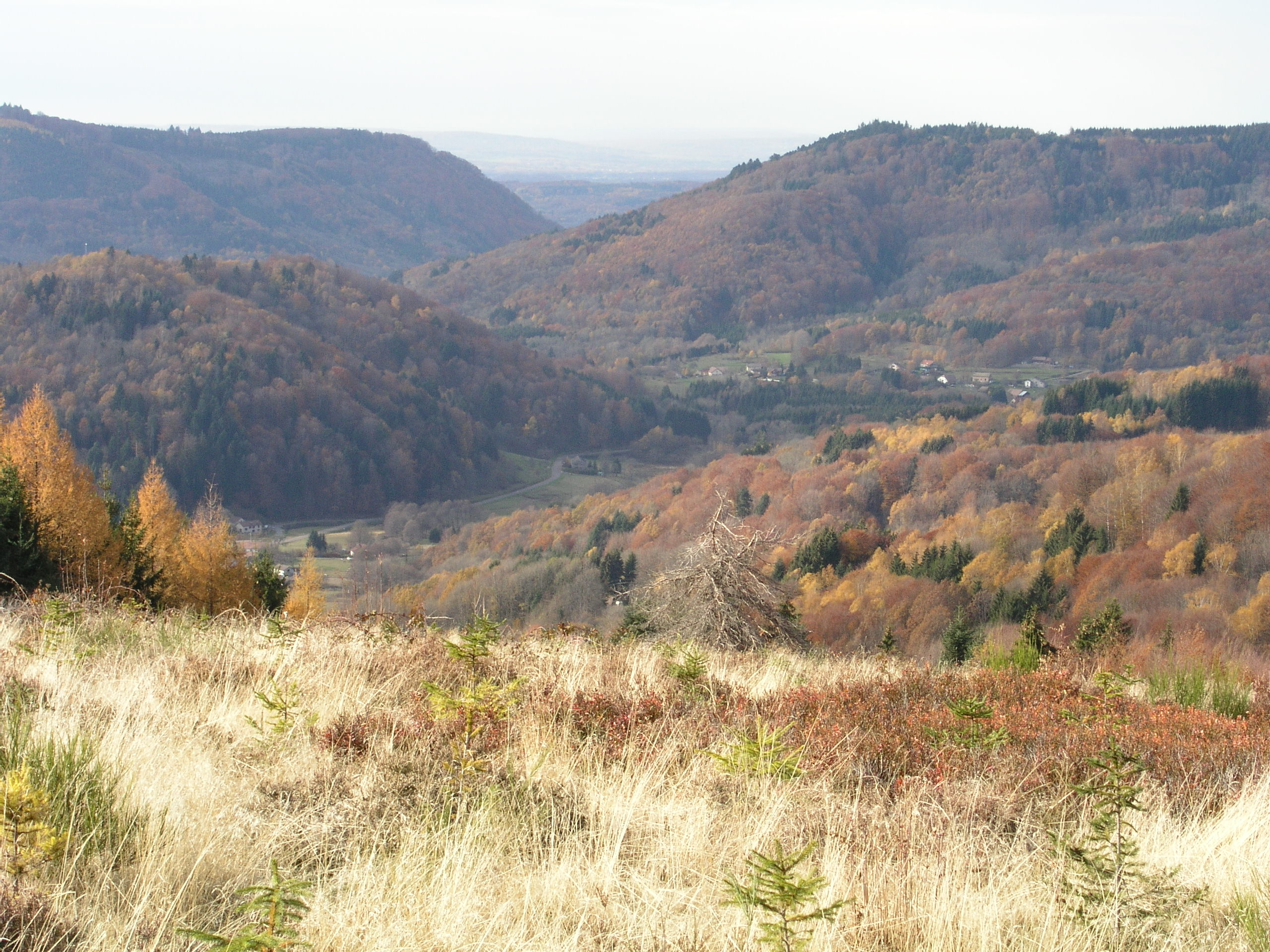 vue de la vallée de Fresse depuis une zone menacée par le reboisement